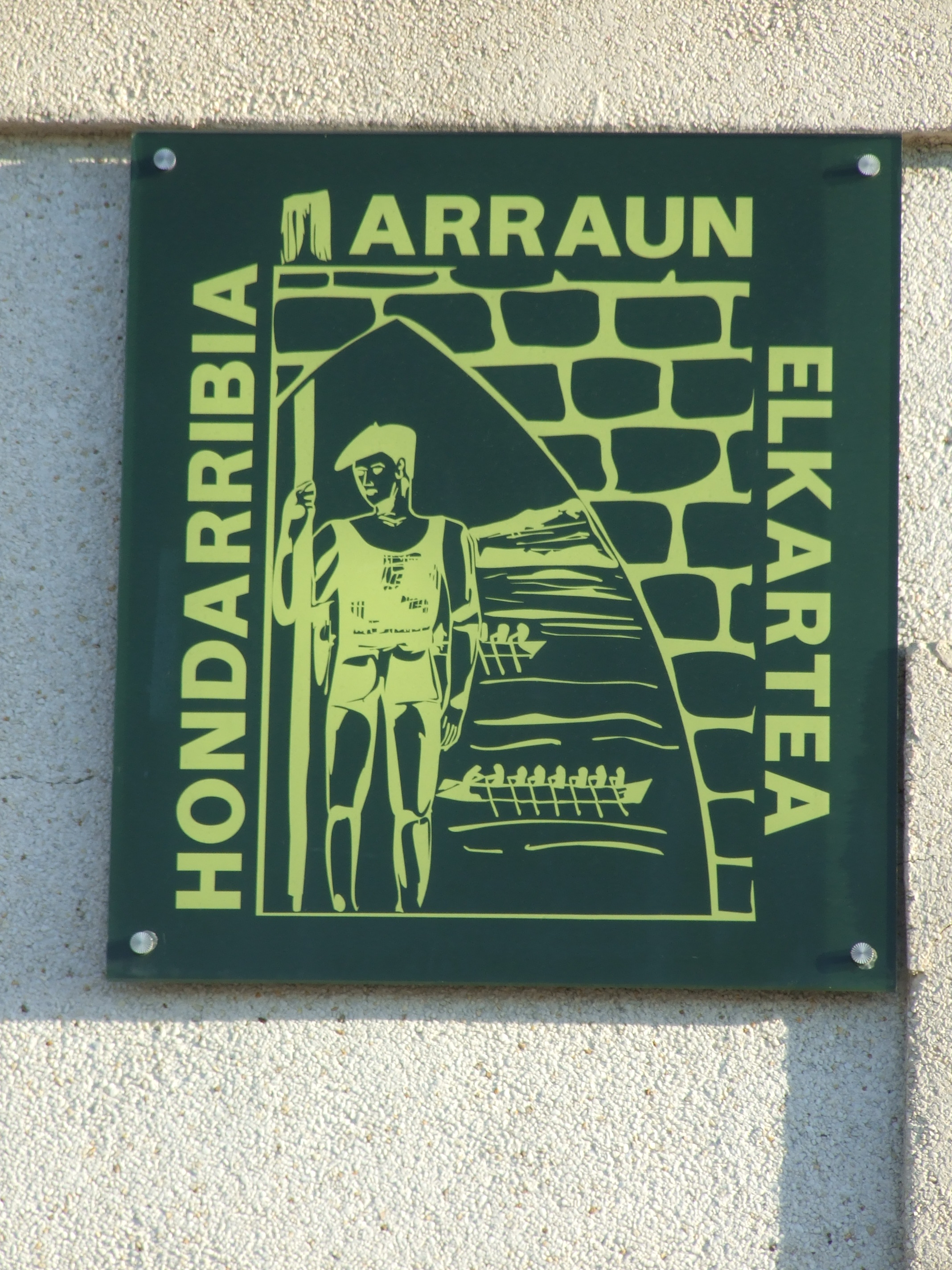 Escudo en la fachada de las instalaciones del Hondarribia Arraun Elkartea.